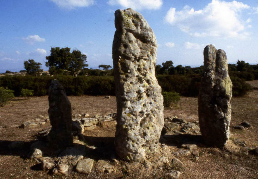 Pranu Mutessu